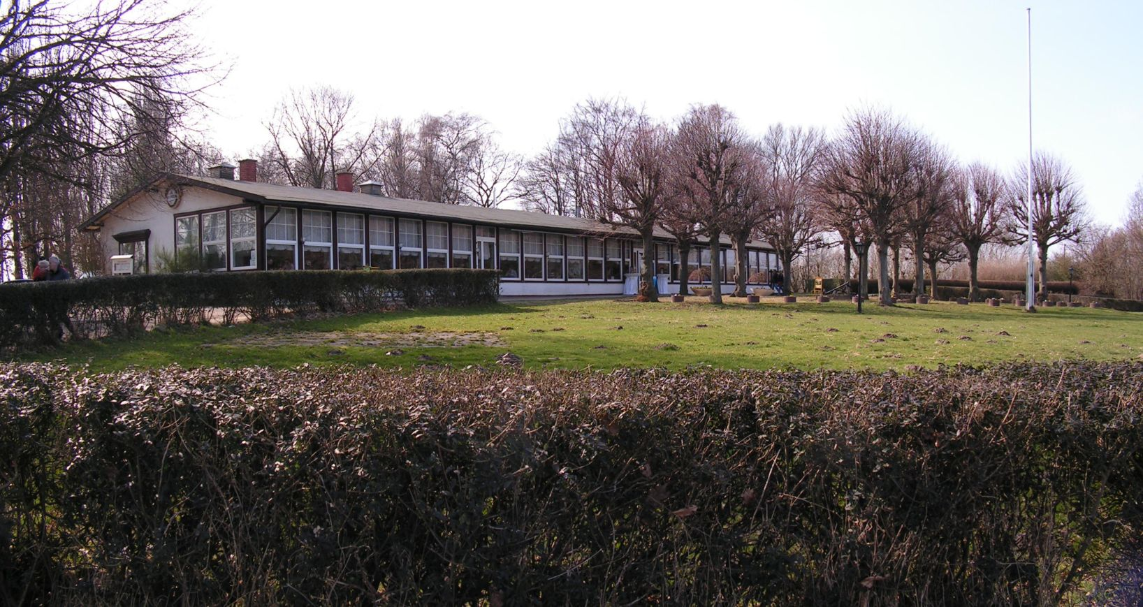 Brodten/Altes Ausflugslokal Hermannshöhe (2011 abgerisssen)